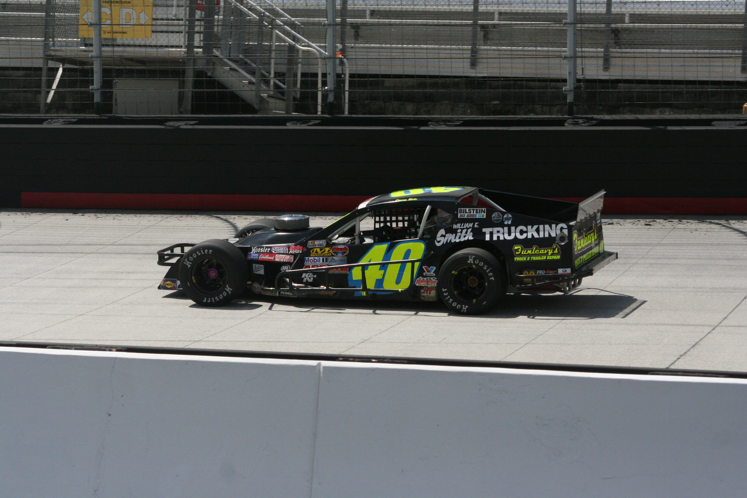 Danny Bohn